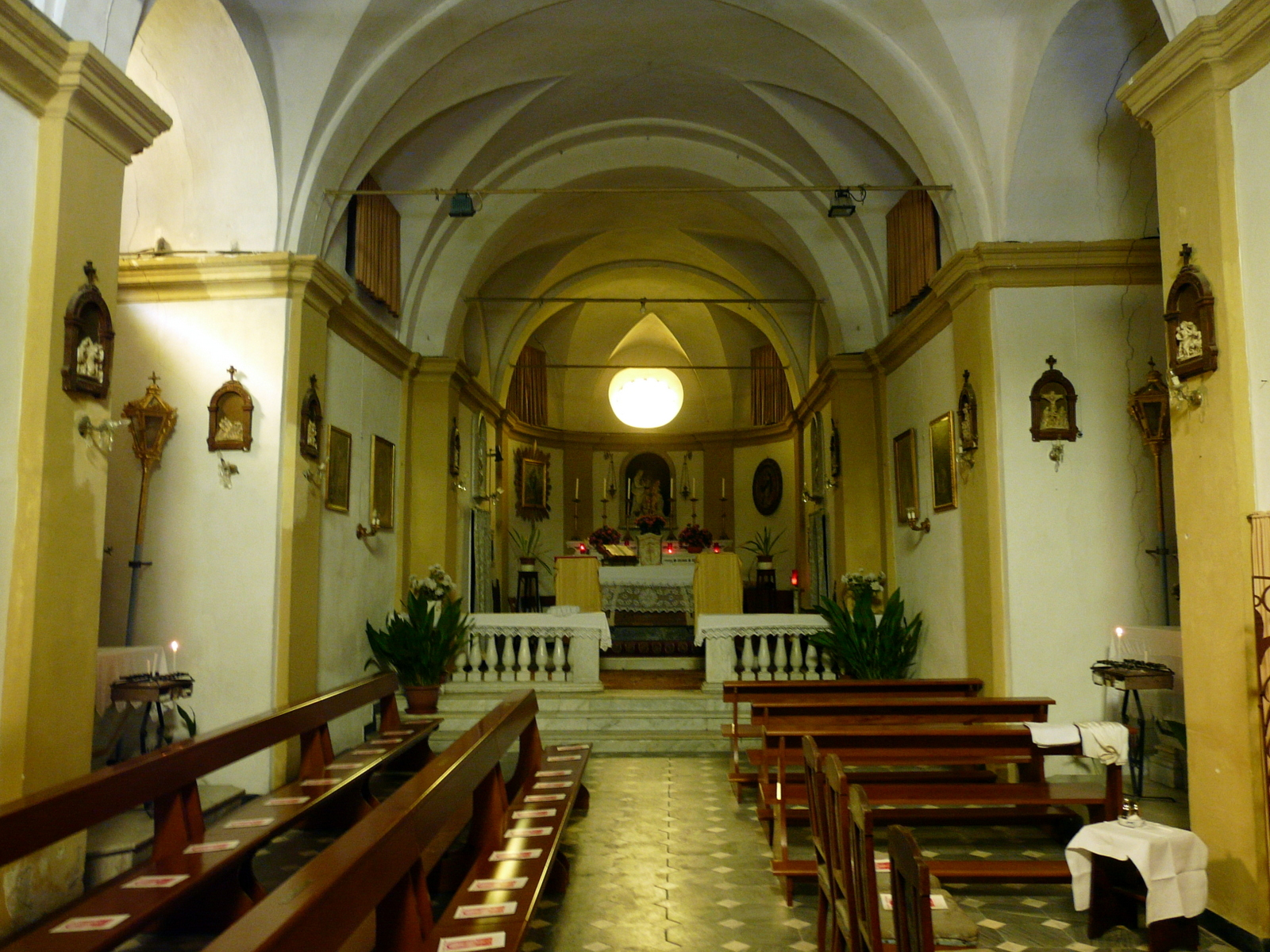 La navata della chiesa di Nostra Signora di Caravaggio, Calcinara, Uscio, Liguria, Italia